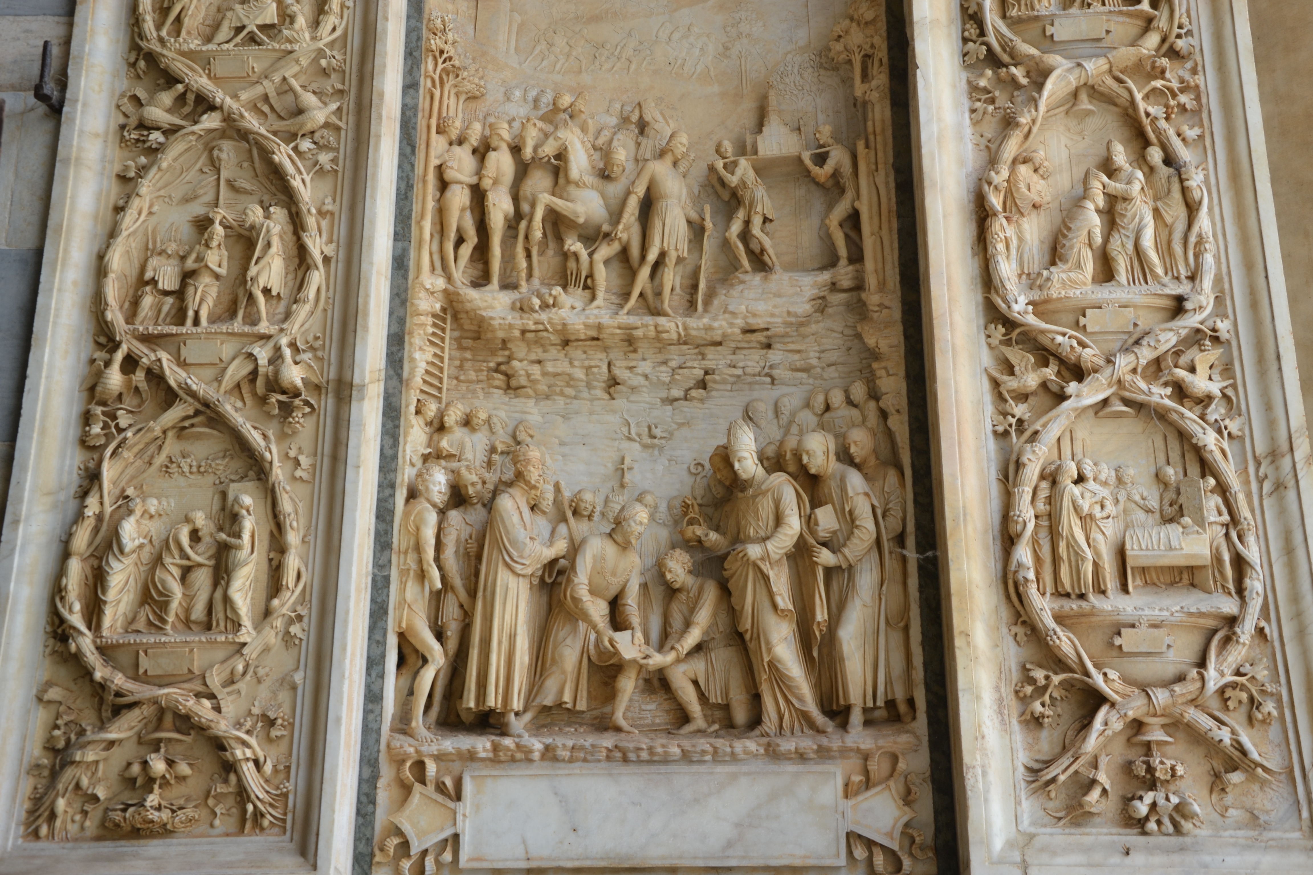 Certosa di Pavia, dettaglio dei bassorilievi del portale, Benedetto Briosco (1501), Gian Galeazzo Visconti posa la prima pietra, Storie della vita di sant'Ambrogio e storie della vita di Cristo